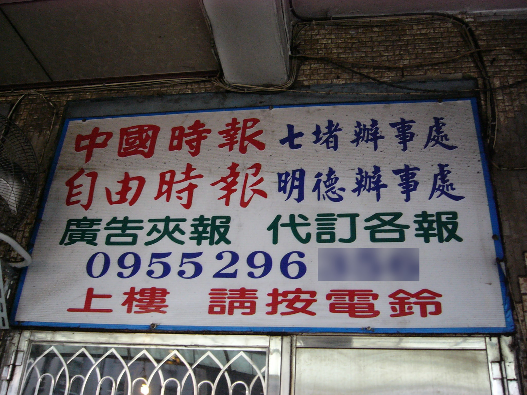 《中國時報》七堵辦事處與《自由時報》明德辦事處，是位於基隆市七堵區明德一路的同一家派報社。